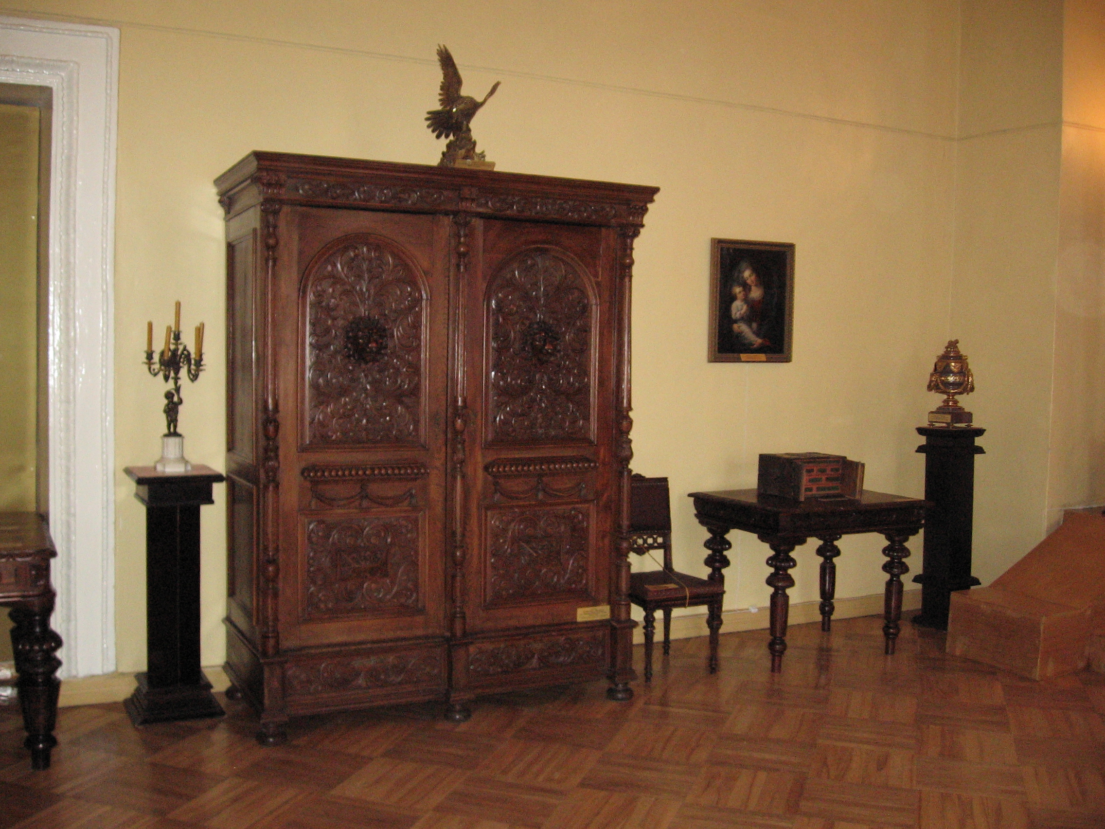 Беларуская (тарашкевіца): Ансамбль Новага замка:палац з двума флігелямібрама і агароджагаспадарчая пабудова. г. Горадня This is a photo of Belarusian heritage monument. Reference number: 412Г000015 ( WLM)